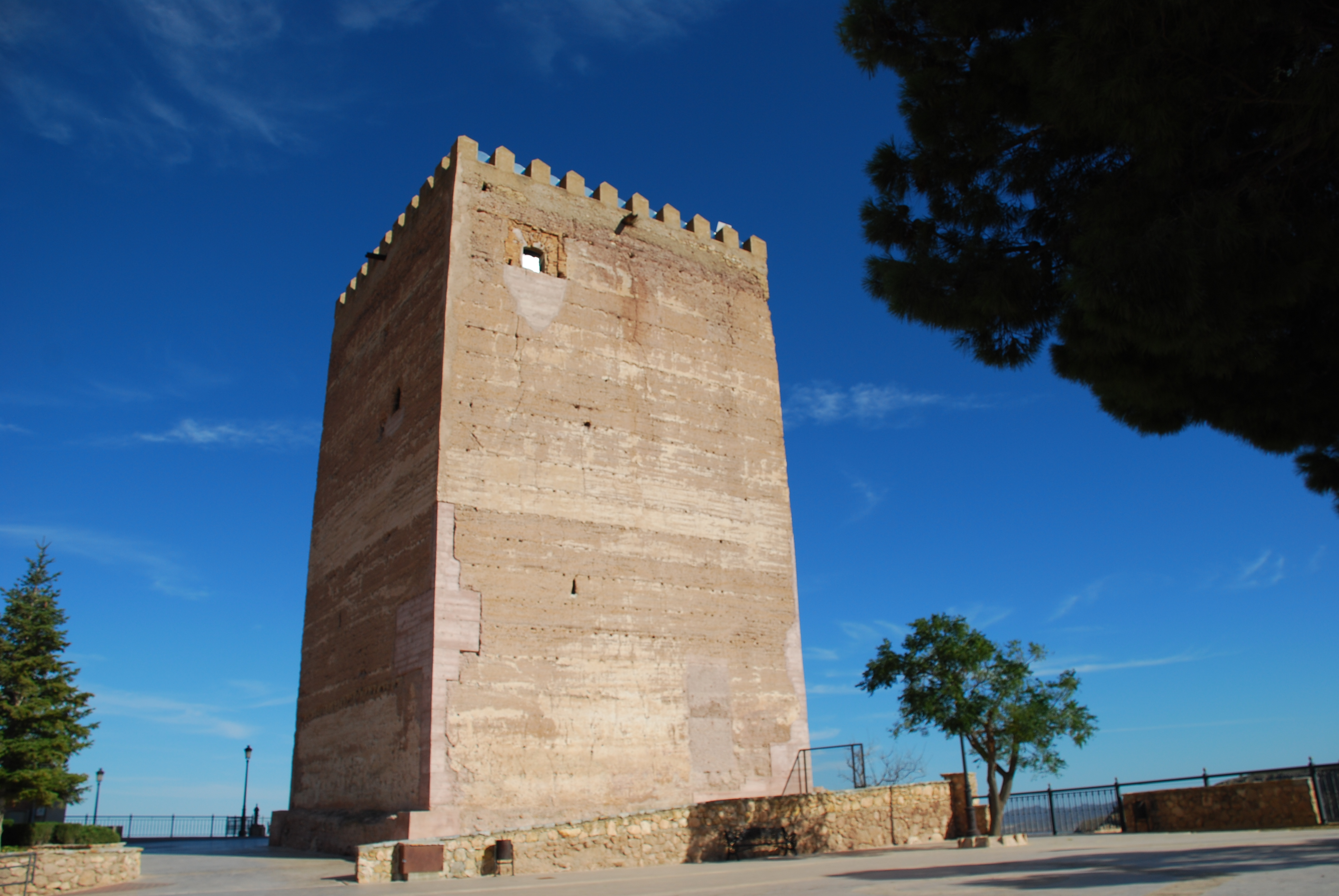 Castillo de Aledo (Aledo - Murcia - Spain)